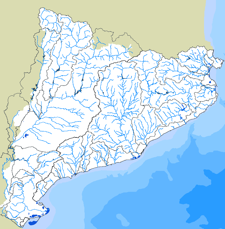 Caracterització de Masses d'aigua de Catalunya: Rius, Embassaments, Zones Humides i Estanys . En base cartografia IMPRESS